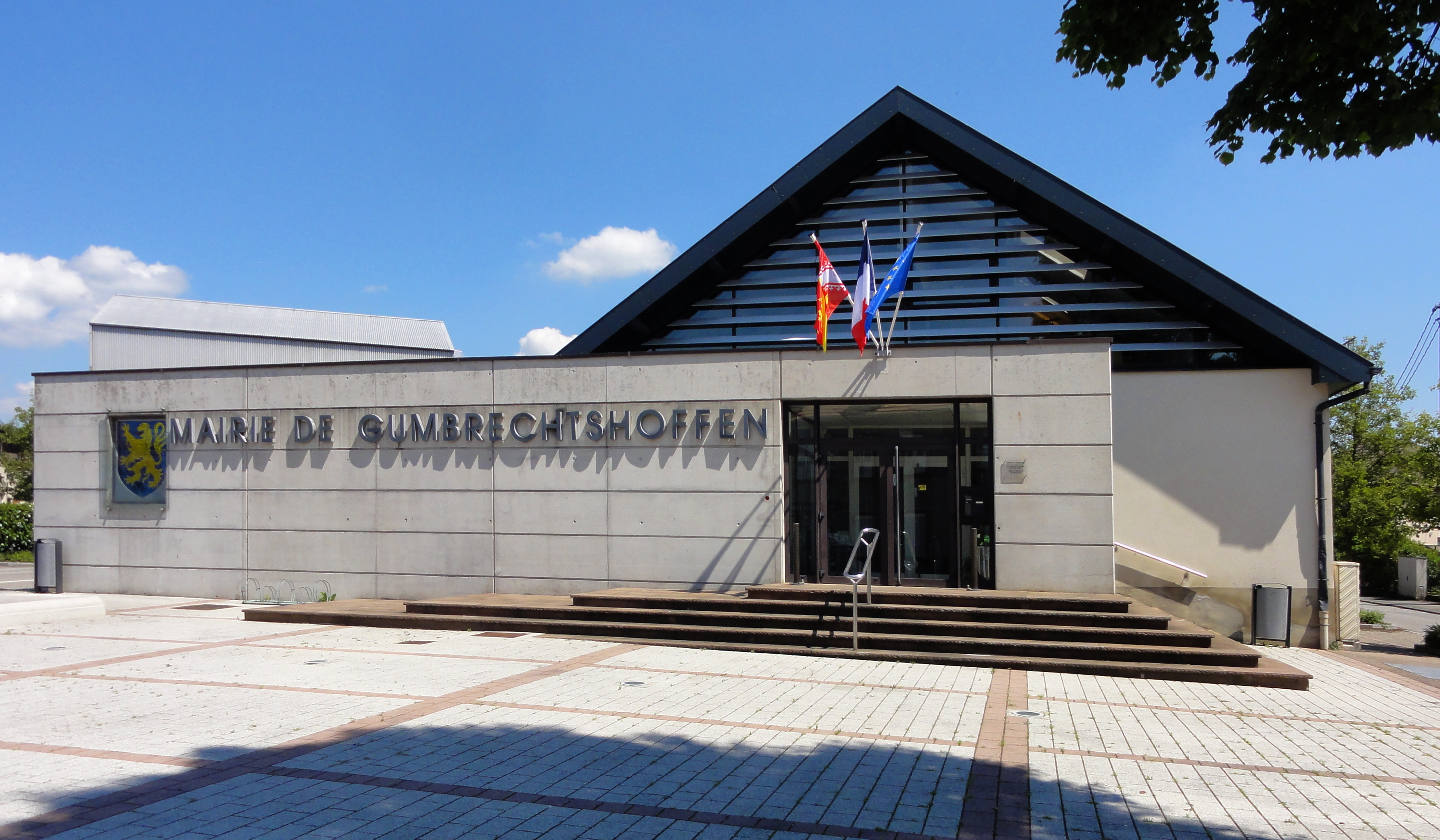 Alsace, Bas-Rhin, Gumbrechtshoffen, Mairie, place de la Mairie.